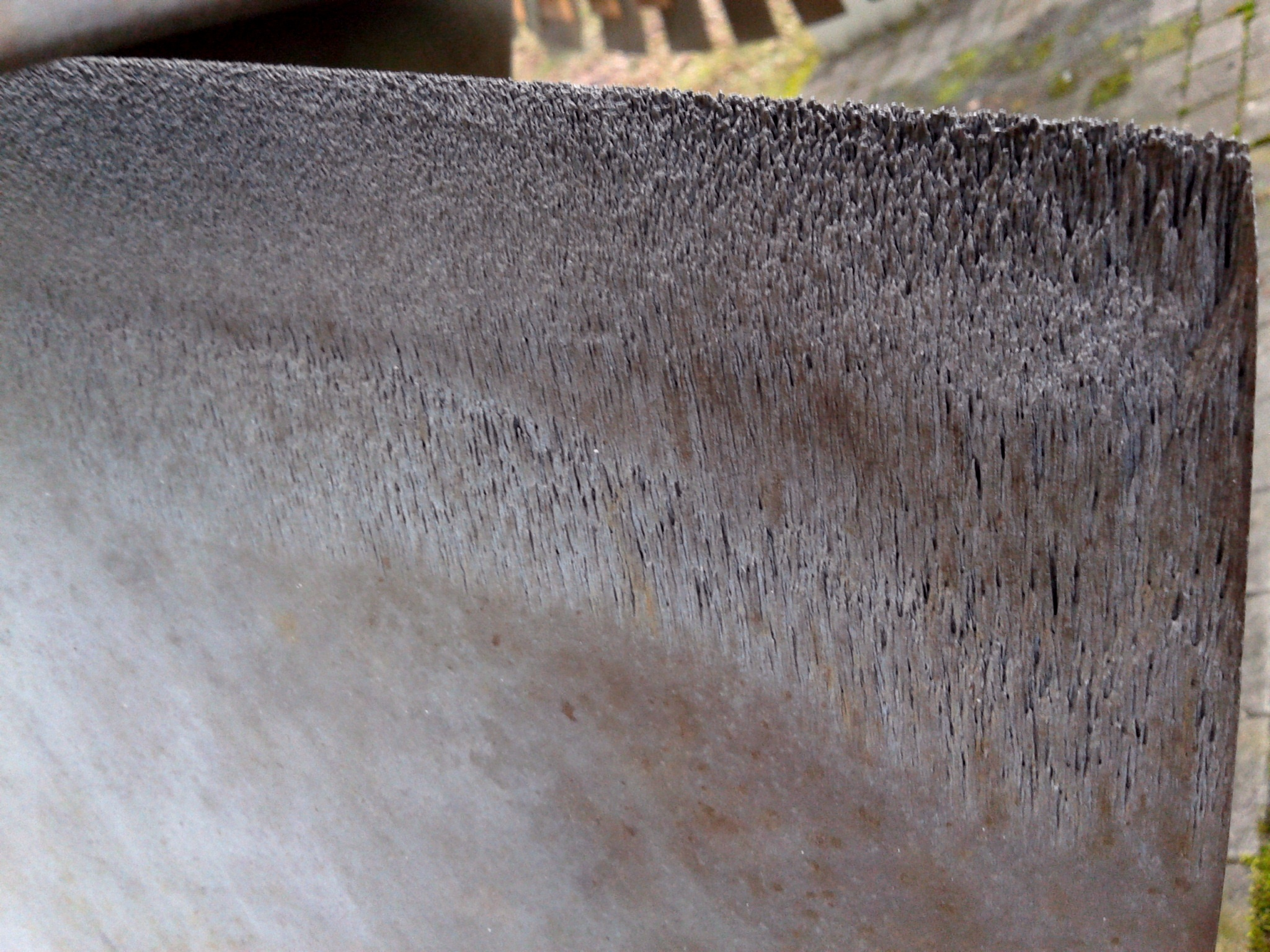 erodierte Rückseite einer Dampfturbinenschaufel. Ausgemusterter Niederdruckteil aus dem Heizkraftwerk Altbach/Deizisau